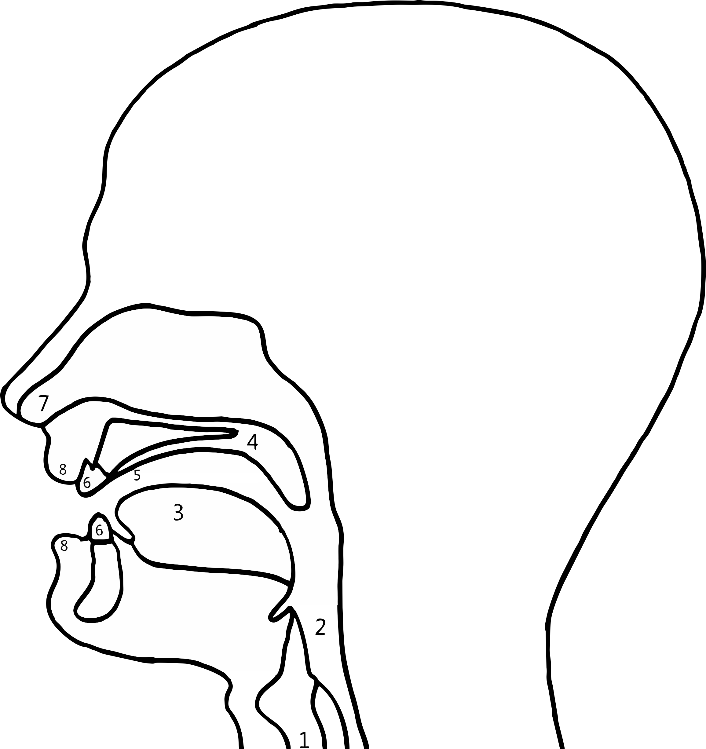 नेपाली: उच्चारण स्थान को संकेत चित्रण